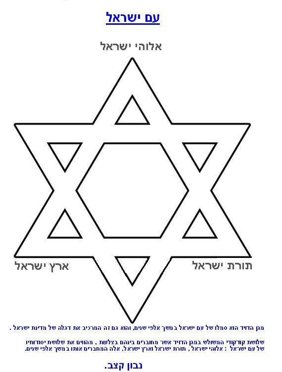 מגן הדויד הוא סמלו של עם ישראל במשך אלפי שנים, והוא גם זה המרכיב את דגלה של מדינת ישראל . שלושת קודקודי המשולש במגן הדויד אשר מחוברים בינהם בצלעות , מהווים את שלושת יסודותיו של עם ישראל : אלוהי ישראל , תורת ישראל וארץ ישראל, אלה המחברים אותו במשך אלפי שנים.